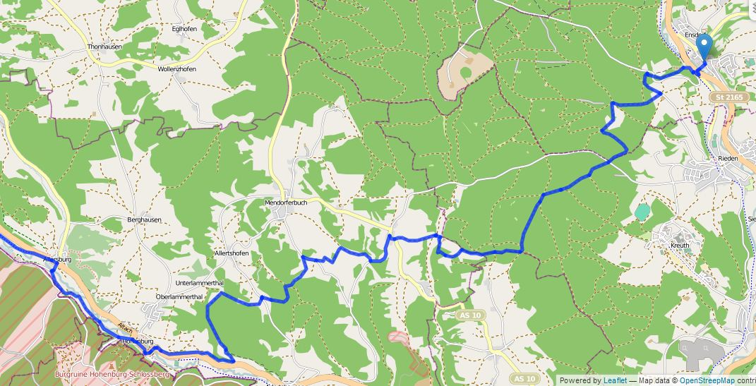 Jakobsweg von Ensdorf nach Hohenburg © OpenStreetMap contributors